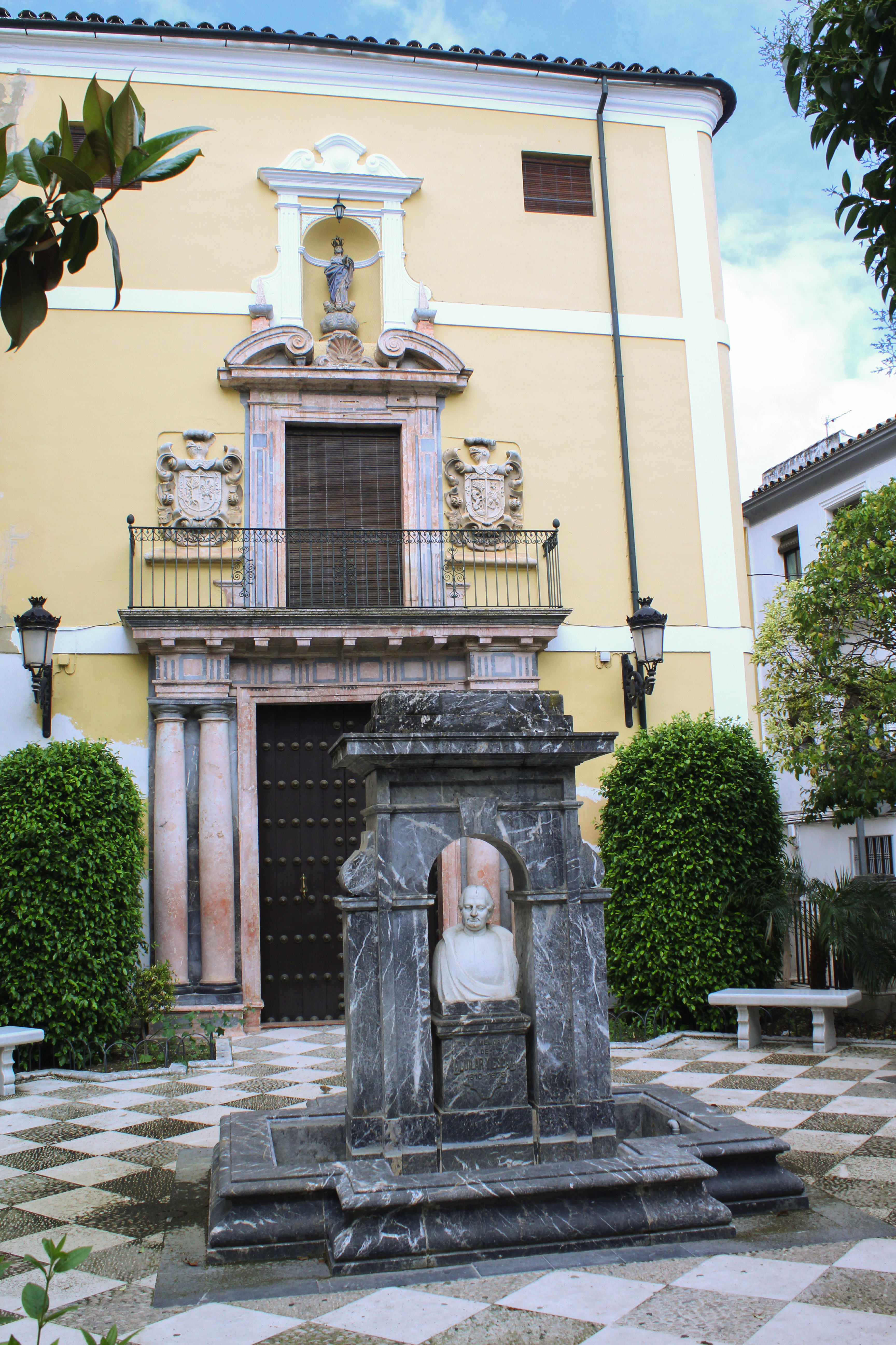 Portada del instituto Aguilar y Eslava